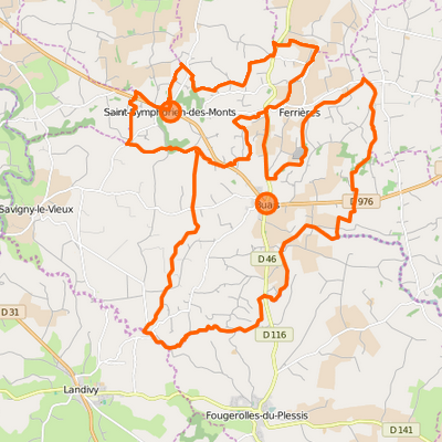 Carte de la commune nouvelle et des communes déléguées